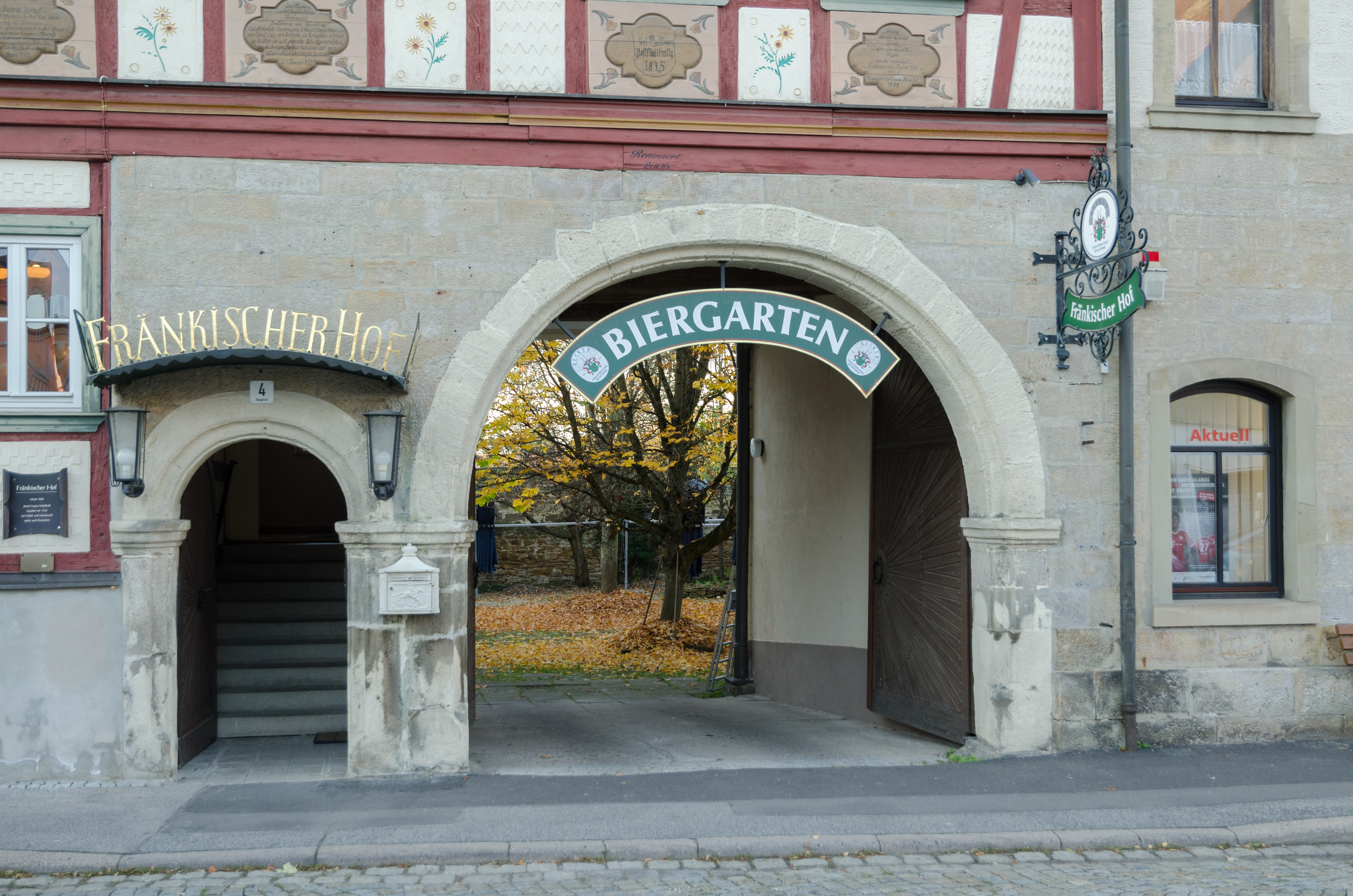 Hofheim in Unterfranken, Hauptstraße 4 und 6